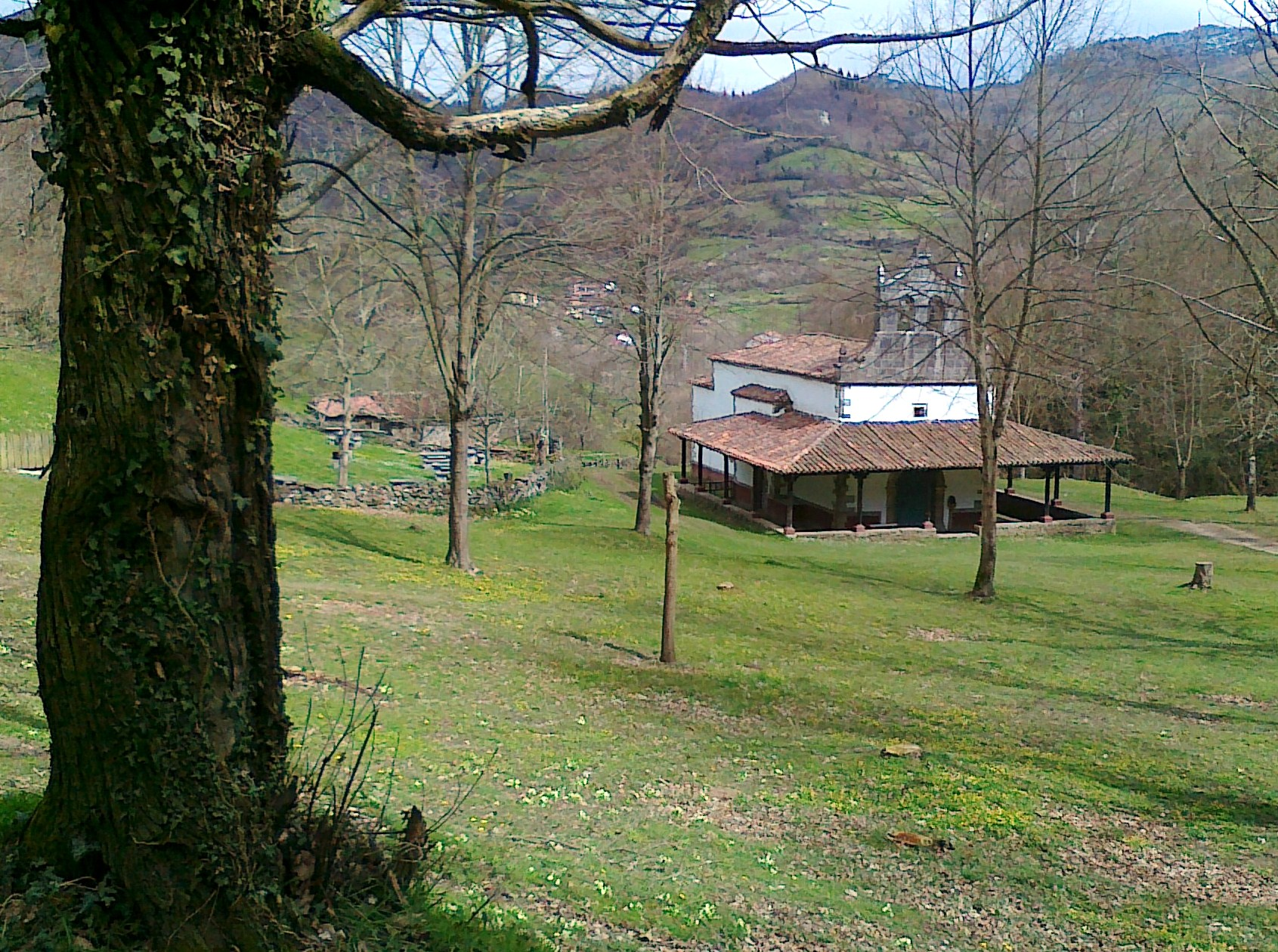 Santuario de Miravalles desde la lejanía de la carretera de acceso.